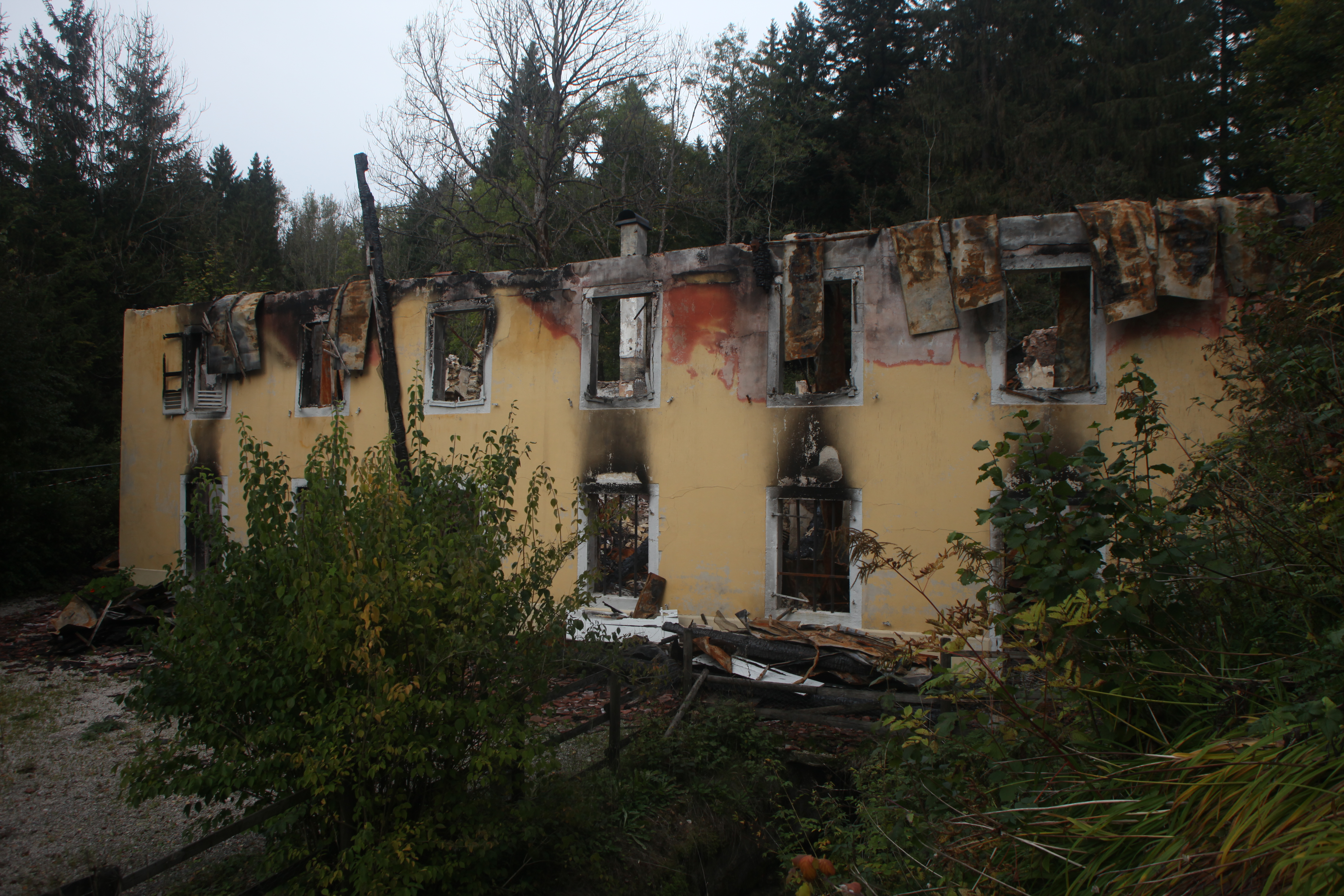 Restes de la maison dite La Clouterie après l'incendie du 20 juillet 2015.